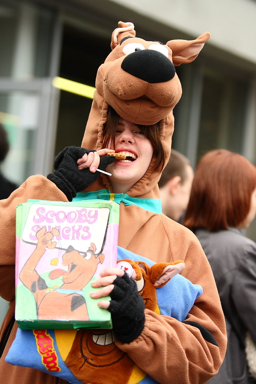 Paris Manga 9, February 2010, Parc des expositions de la porte de Versailles.